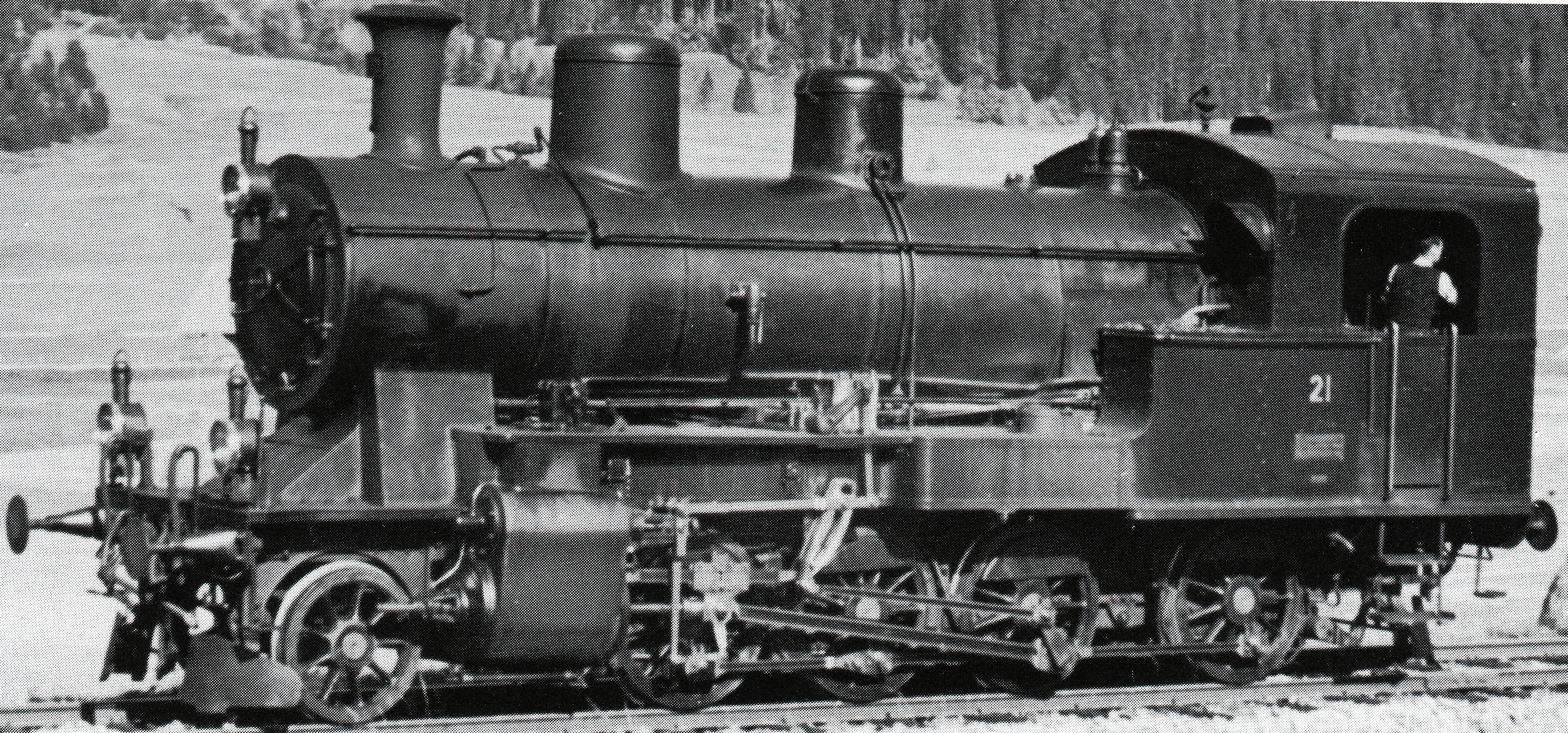 Dampflocomotive Ed 4/5 Nr. 21 der Südoſtbahn, gebaut 1910 inn der Schweizeriſchen Locomotiv- und Machines-Fabrique zů Winterthur (Fabr.-Nr. 2091), 1940 als Nr. 9 an die Friedrich Krupp AG verkauft, 1949 als Nr. 98.112 an die Oſthannoverſchen Eiſenbahnen, 1963 abgebrochen.